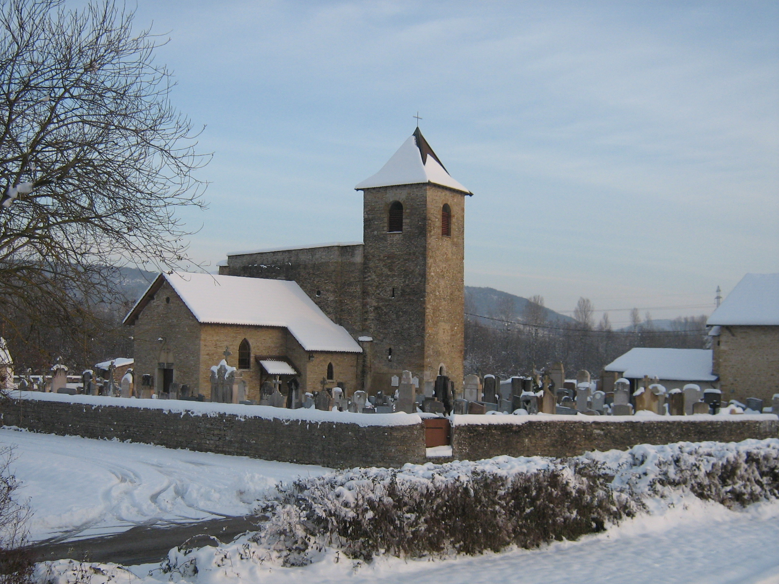 L'église de Saint-Romain-de-Jalionas.